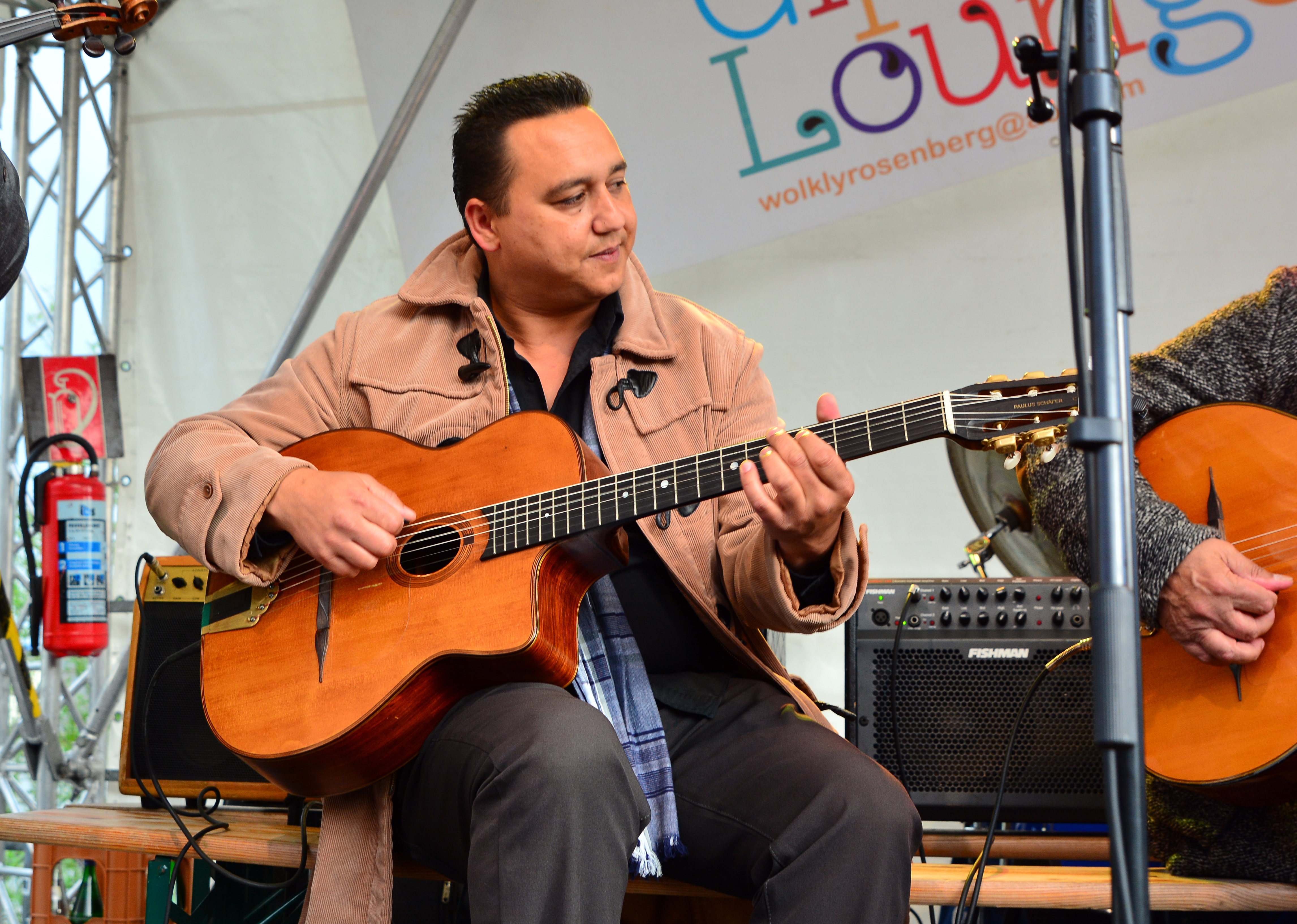 Best of Jazz Manouche (Paulus Schäfer) beim Hafen Rock 2015 in Hamburg